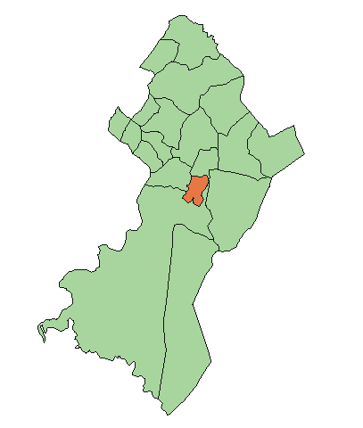 Ubicación de Guarambaré.